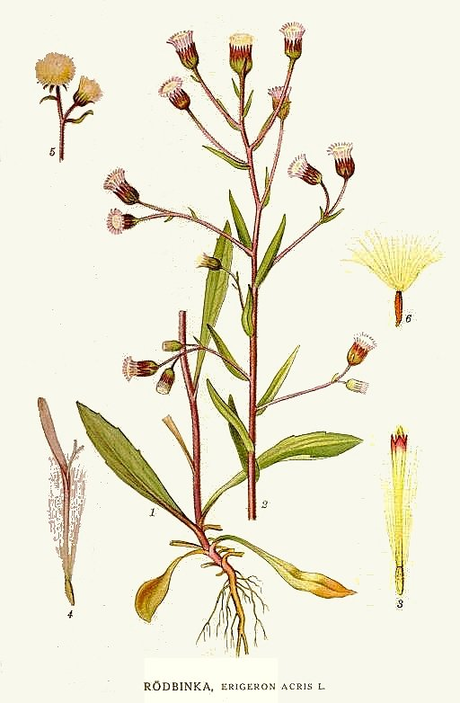 Original Description Rödbinka, Erigeron acris L.